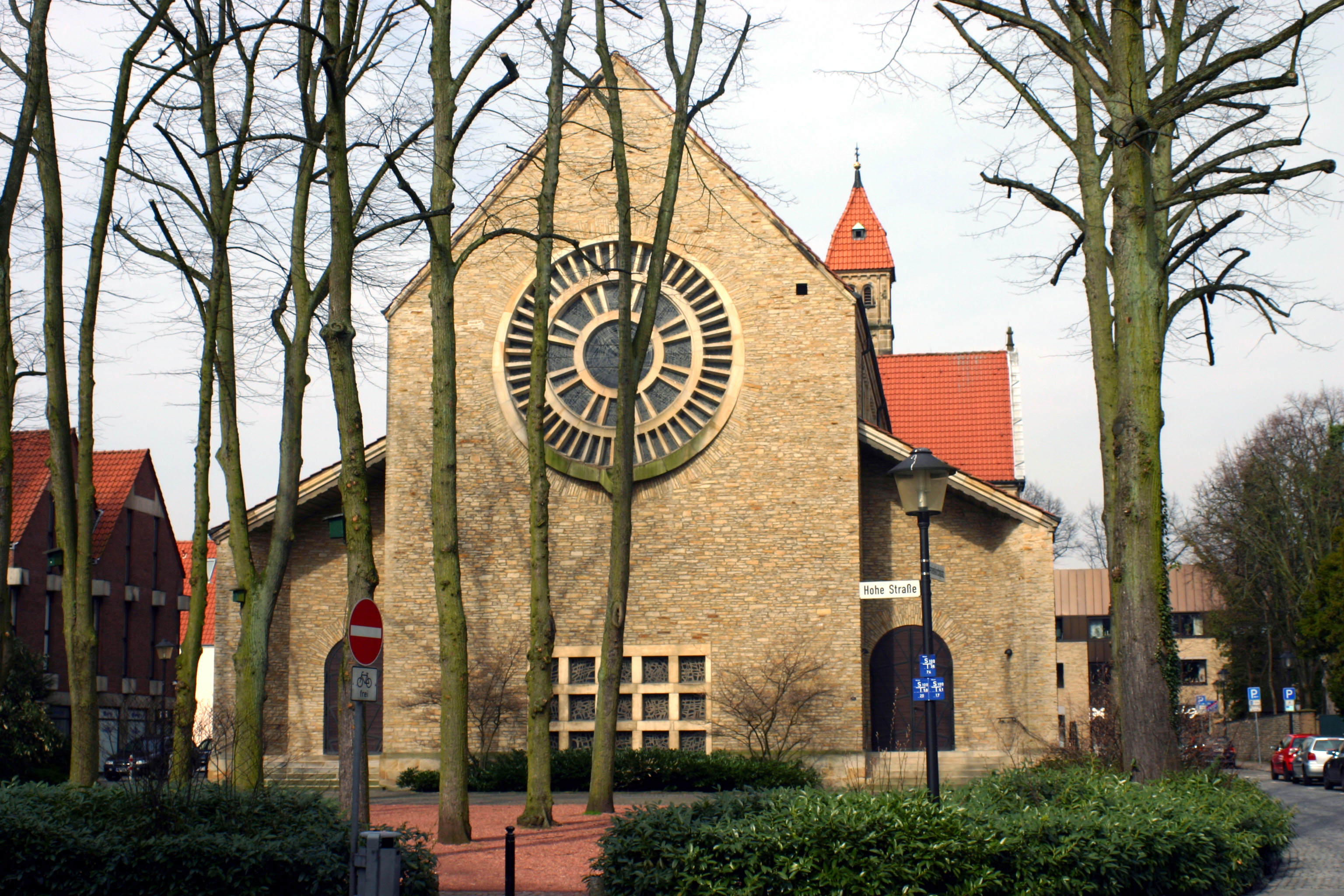 Sankt Marien in Warendorf